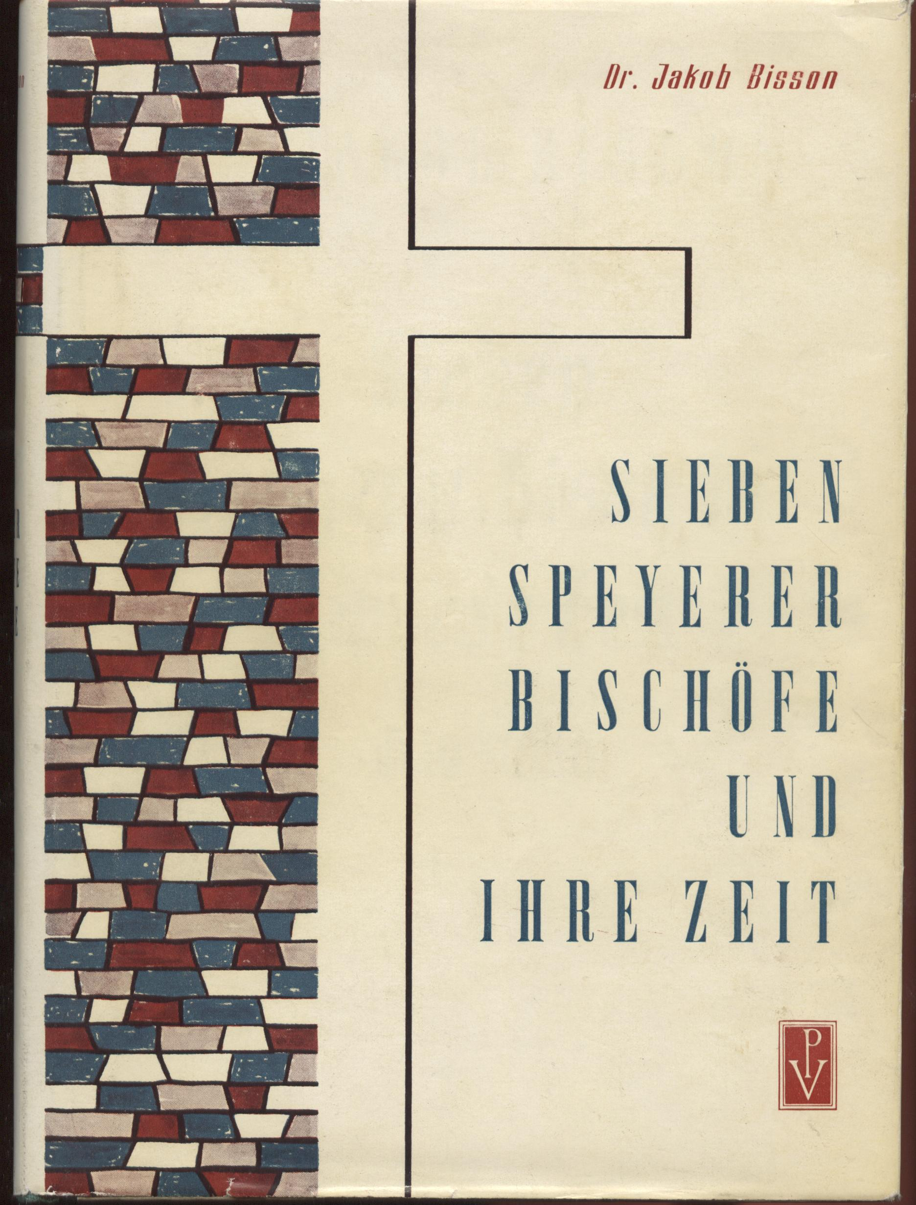 Jakob Bisson Speyer, Buch zur Kirchengeschichte